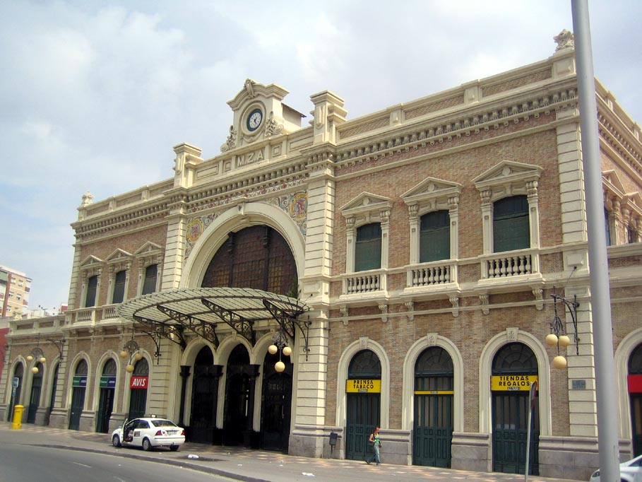 Train station of Cartagena (Spain). Estación de tren de Cartagena (España).